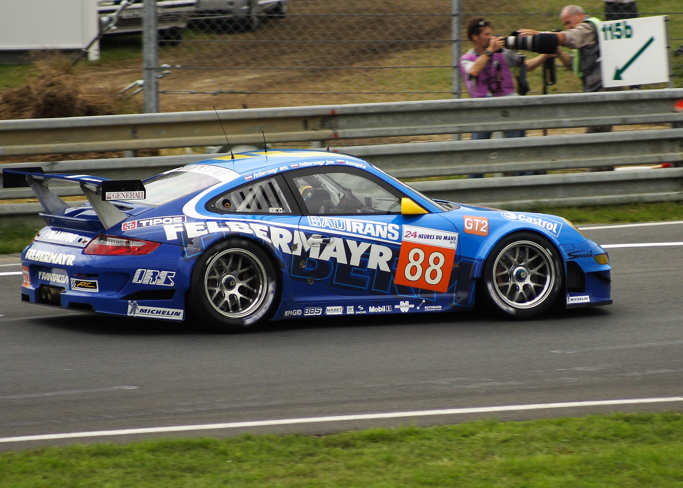 Le Mans 24 Hour Race 2010